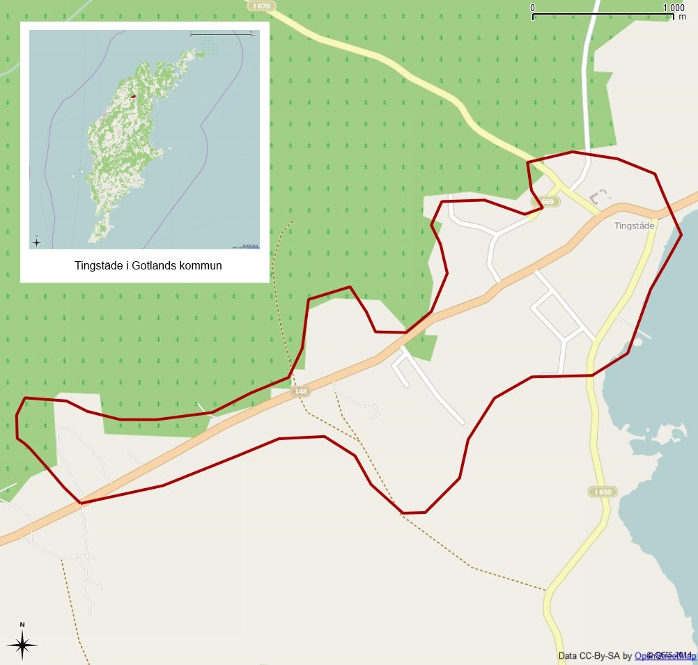 Tätorten Tingstädes gränser 1990 enligt Atlas över rikets indelningar 1992.